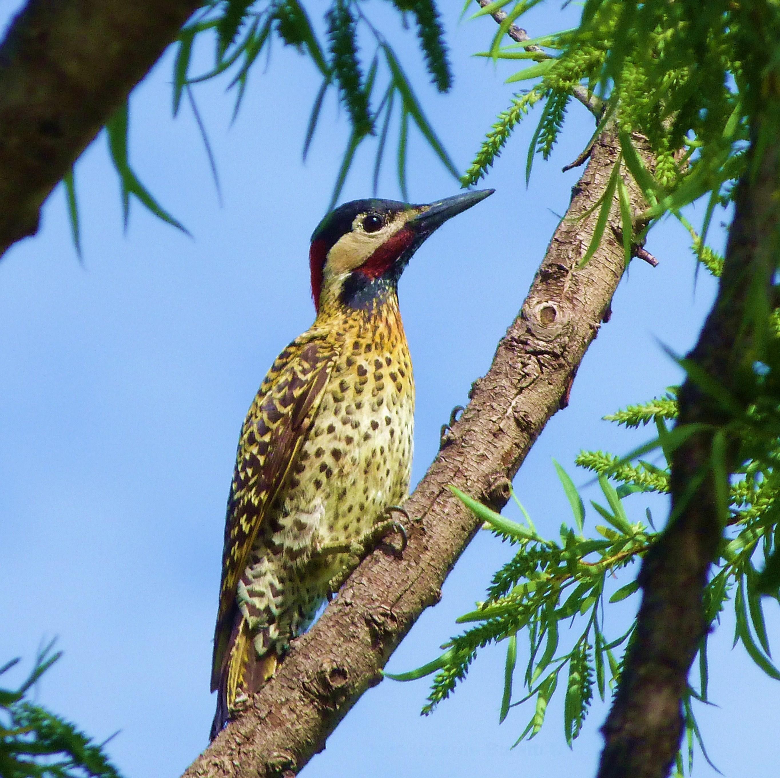 Pájaro Carpintero Real, fotografiado en Río Cuarto, Córdoba, Argentina.